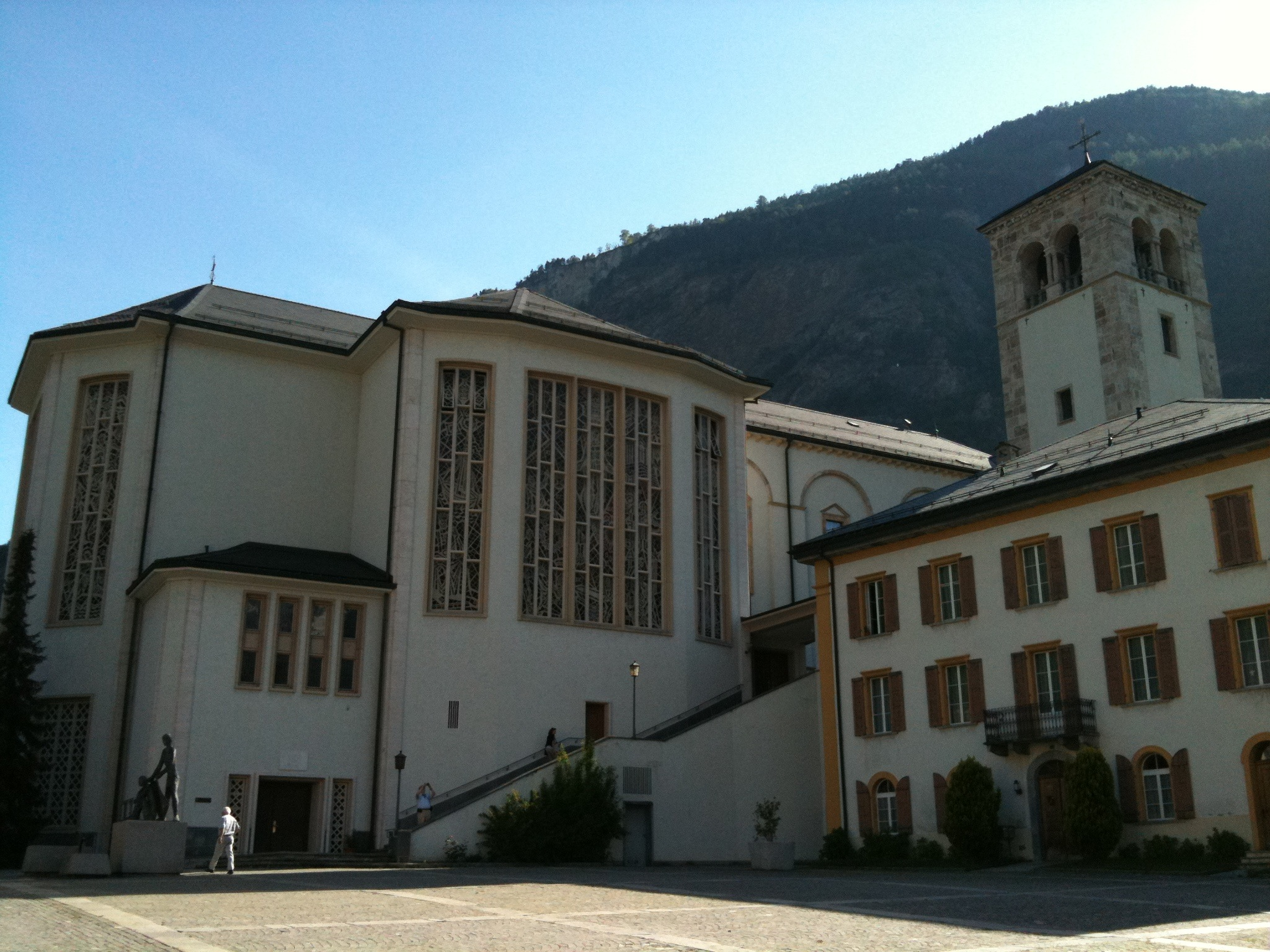 Martinskirche in Visp (Kanton Wallis), im unteren Teil des Gebäudes befindet sich die Bruder-Klaus-Kapelle